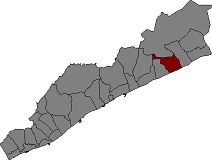 Localització de Pineda de Mar al Maresme